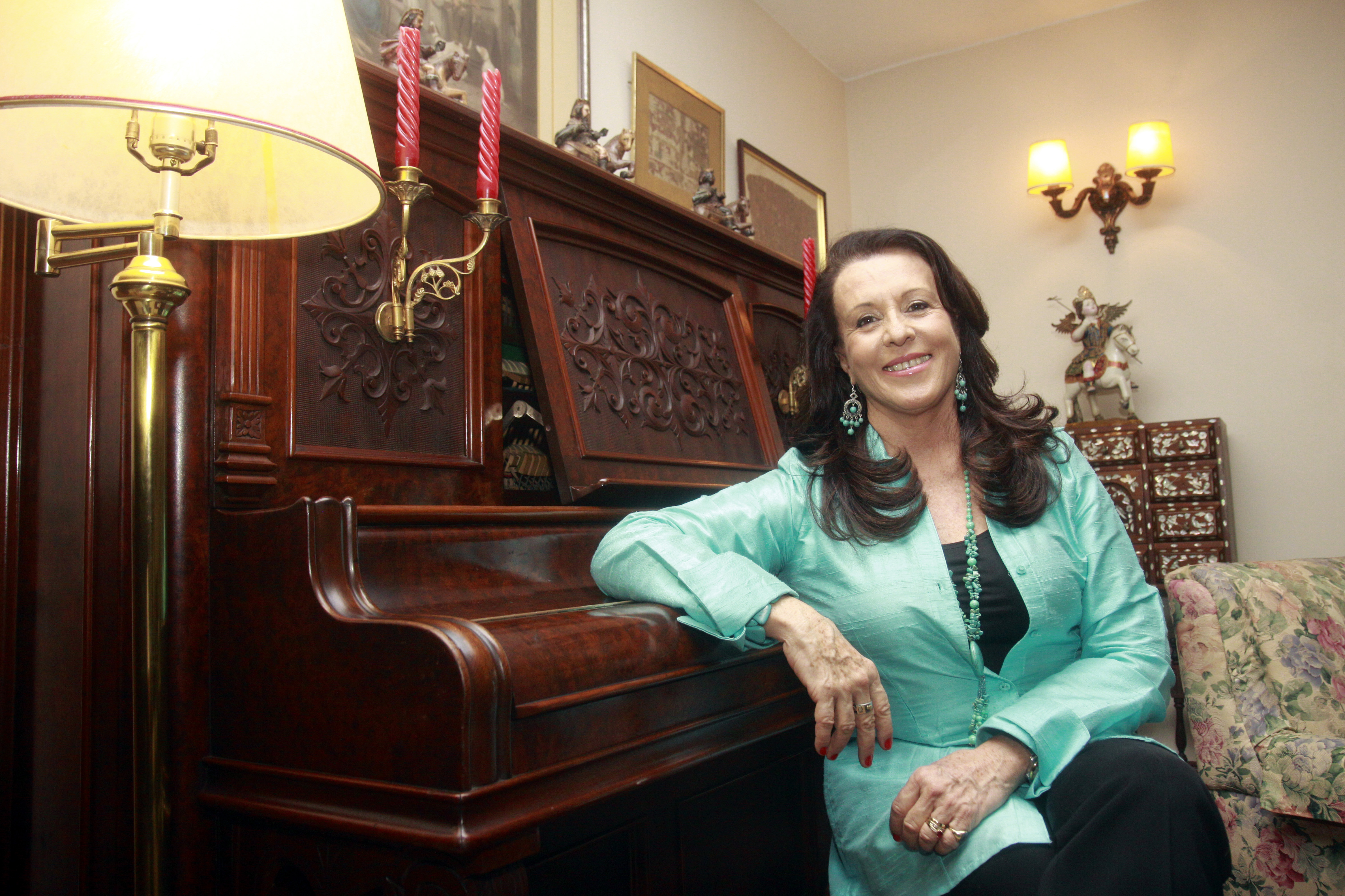 Escritora de Literatura Infantil y Juvenil